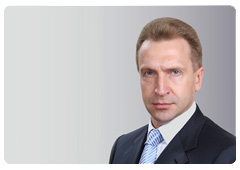 Игорь Иванович Шувалов